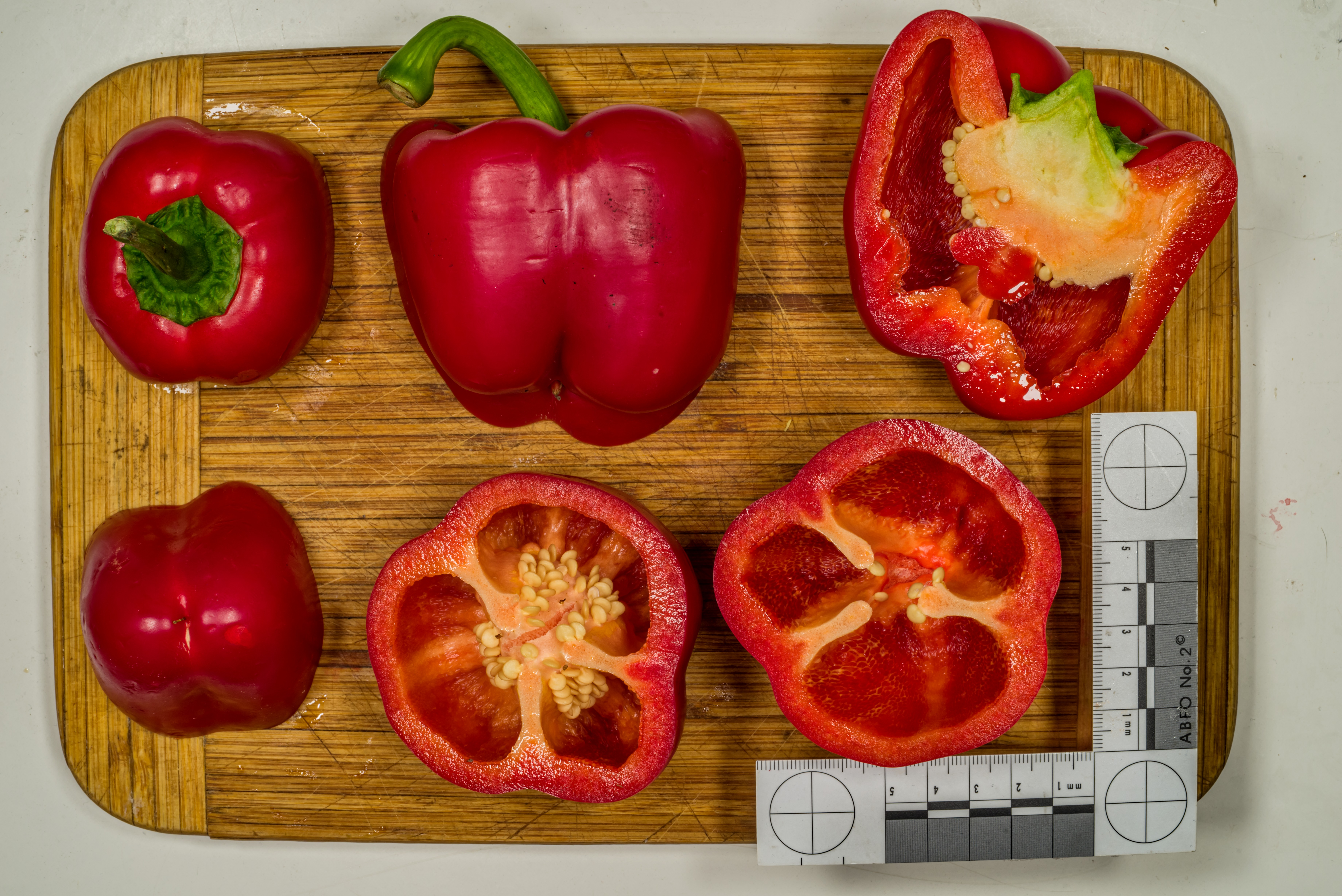 Paprikasorte: Roter Gemüsepaprika